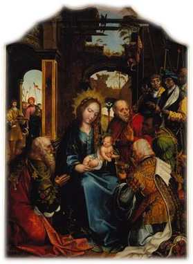 O retábulo "do Paraíso", assim designado uma vez que provém do altar-mor do extinto Convento do Paraíso em Lisboa, foi já objecto de alguns estudos que resultaram em opiniões diversas e divergentes no que toca à sua autoria. Num primeiro momento, o conjunto foi atribuído a Grão Vasco (Vasco Fernandes), por Taborda e Cirilo, opinião refutada por Raczynski que propôs o nome de Abram Prim (Primus). Carl Justi apontou como autor o pintor Velascus e Émile Bartaux dividiu a série em dois conjuntos, atribuindo a "Anunciação", a "Visitação" e a "Natividade" a Cristóvão de Figueiredo, e os restantes painéis ao "Mestre do Retábulo de Santiago". Foi, porém, José de Figueiredo quem reagropou novamente as oito pinturas e as enquadrou na obra do "Mestre do Paraíso", no que foi secundado por Reinaldo dos Santos. A Myron Malkiel-Jirmounsky, coube alertar para o facto de estarmos na presença de uma obra colectiva e não de um só pintor. Actualmente, e na esteira deste último historiador, ainda que se destaque o nome de Gregório Lopes na atribuição deste conjunto retabular, não há dúvida em se afirmar que se trata de uma obra de parceria, o que é desde logo visível na heterogeneidade pictórica e técnica das várias tábuas que o compõem.